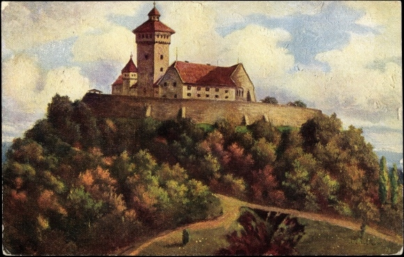 Die Wachsenburg